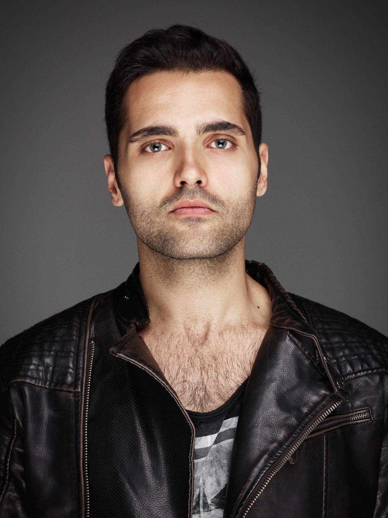 Oyuncu, Müzisyen